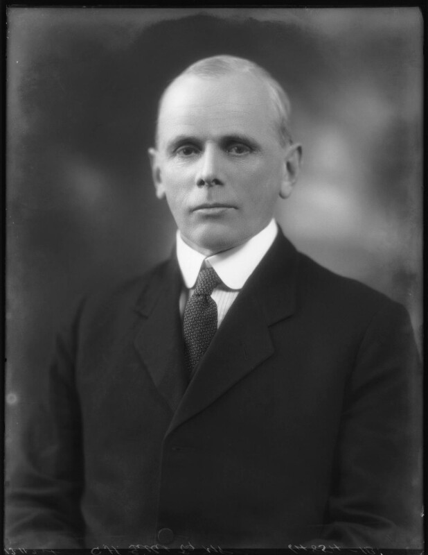 George Gillett